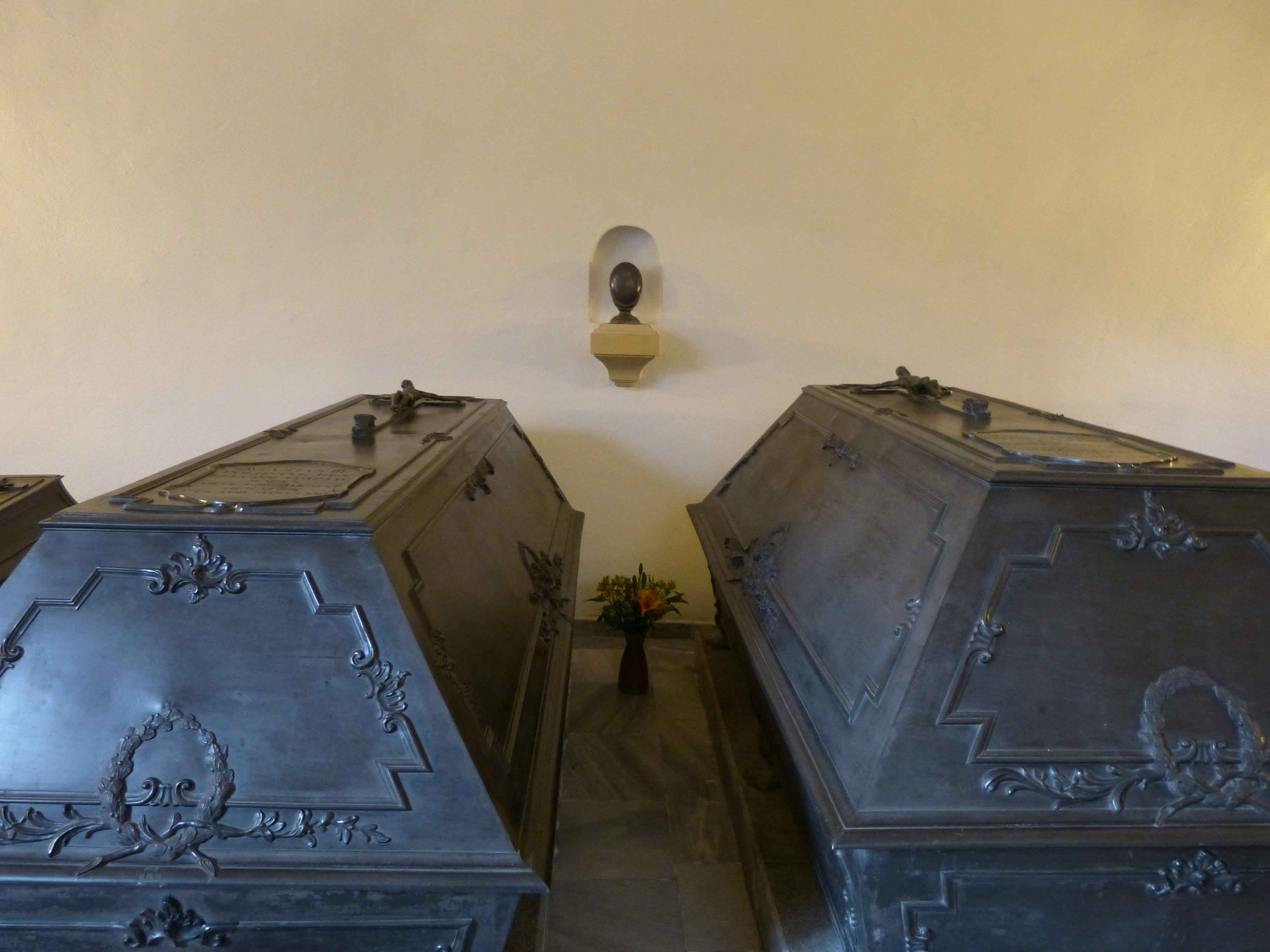 Stiftergruft der Wettiner-Gruft der Katholischen Hofkirche in Dresden, Sachsen